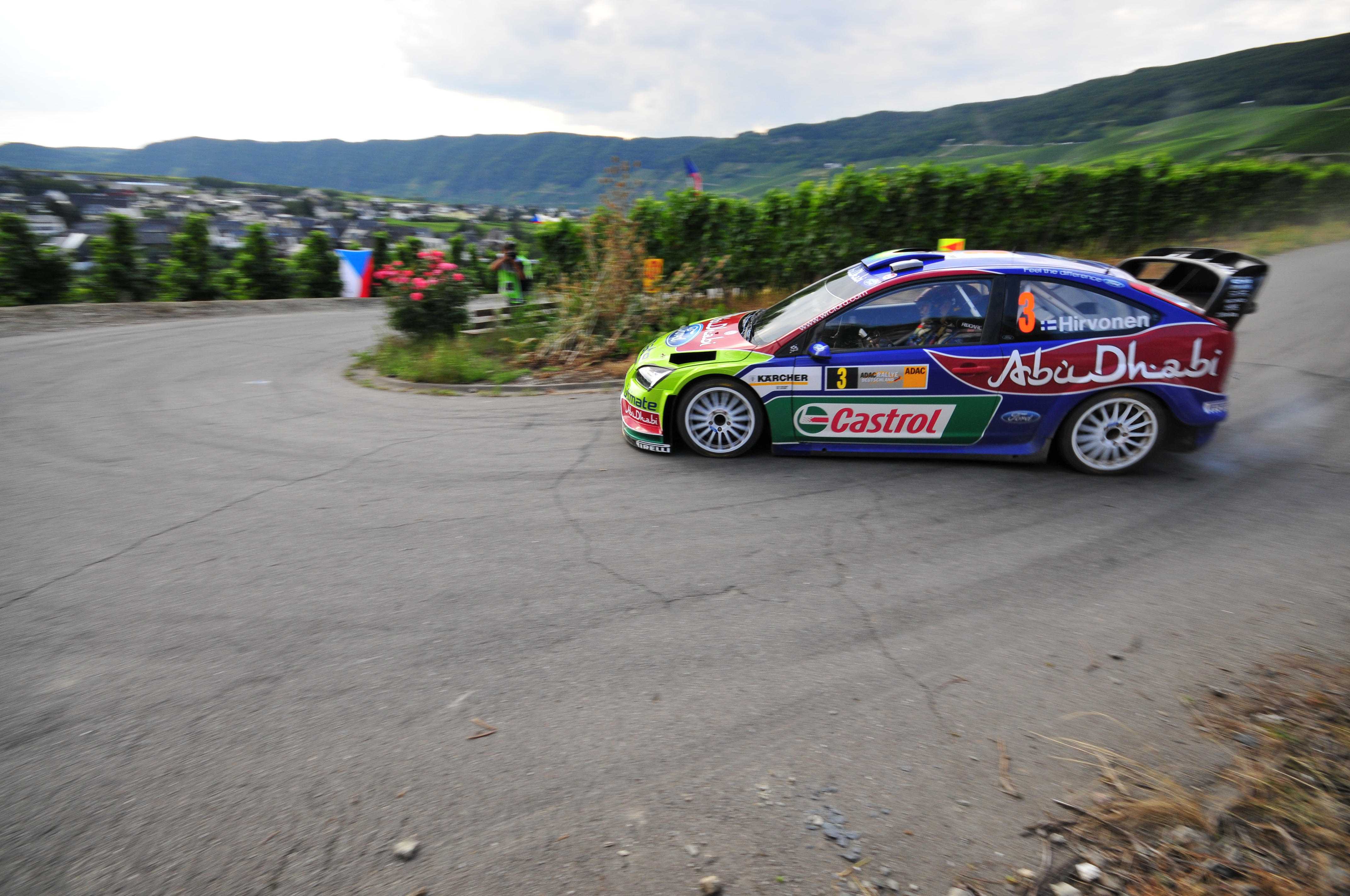 Mikko Hirvonen driving his Ford Focus RS WRC 08 at the 2008 Rallye Deutschland.